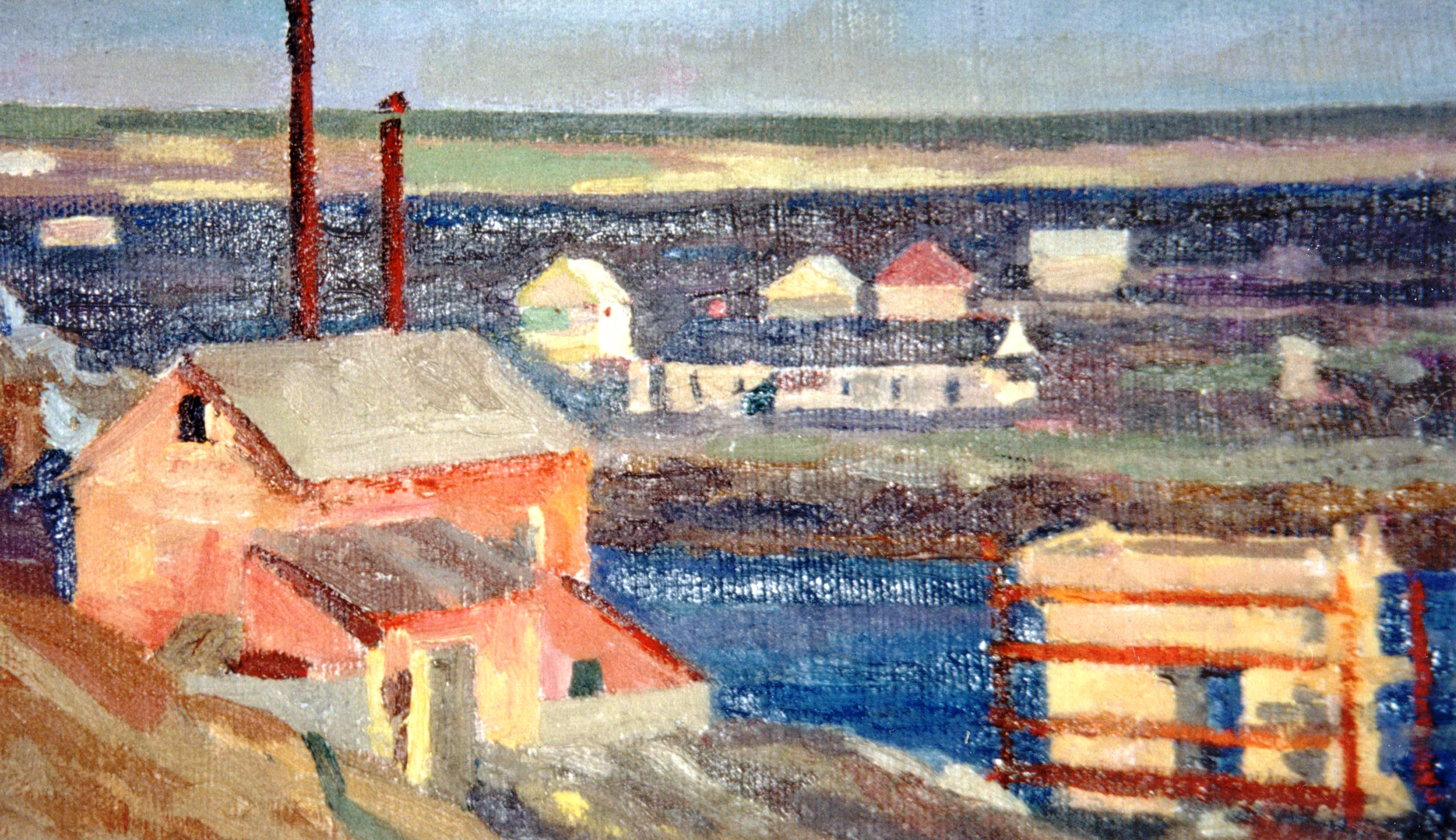 Акварель Селищева А. Н.